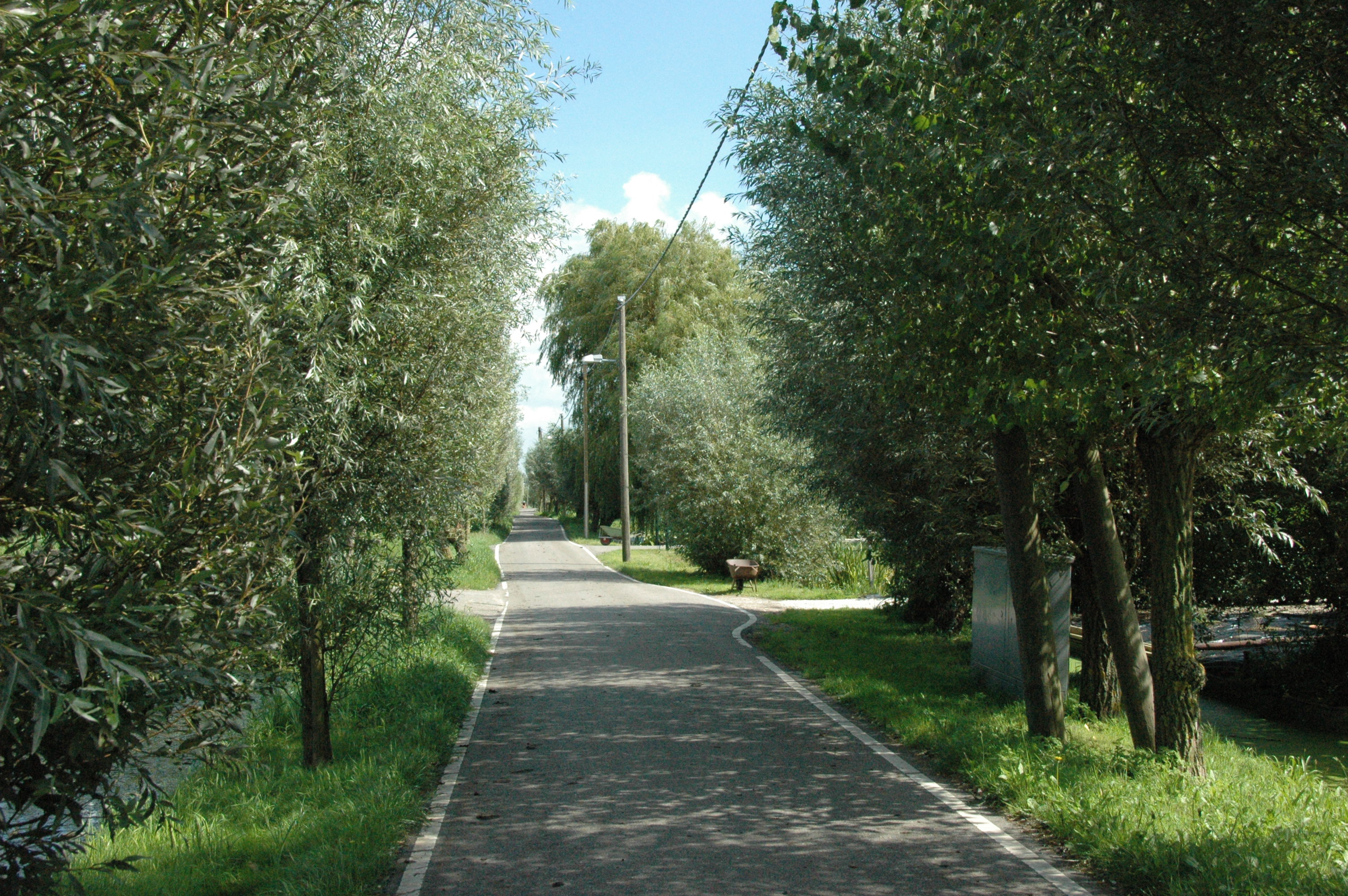 Westeinde, Waarder Categorie:Wikipedia:Afbeeldingen/Gebruiker:P.H. Louw